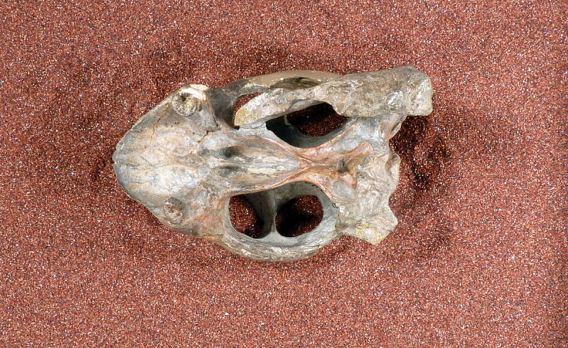 Robertia broomiana King, 1981